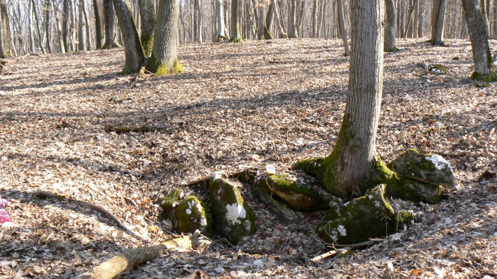 V západnej časti planiny sa na mnohých miestach vyskytujú mocné pokryvné útvary, preto tu škrapy vystupujú len ojedinele. V tomto prípade lemujú tzv. iniciálnu depresiu.